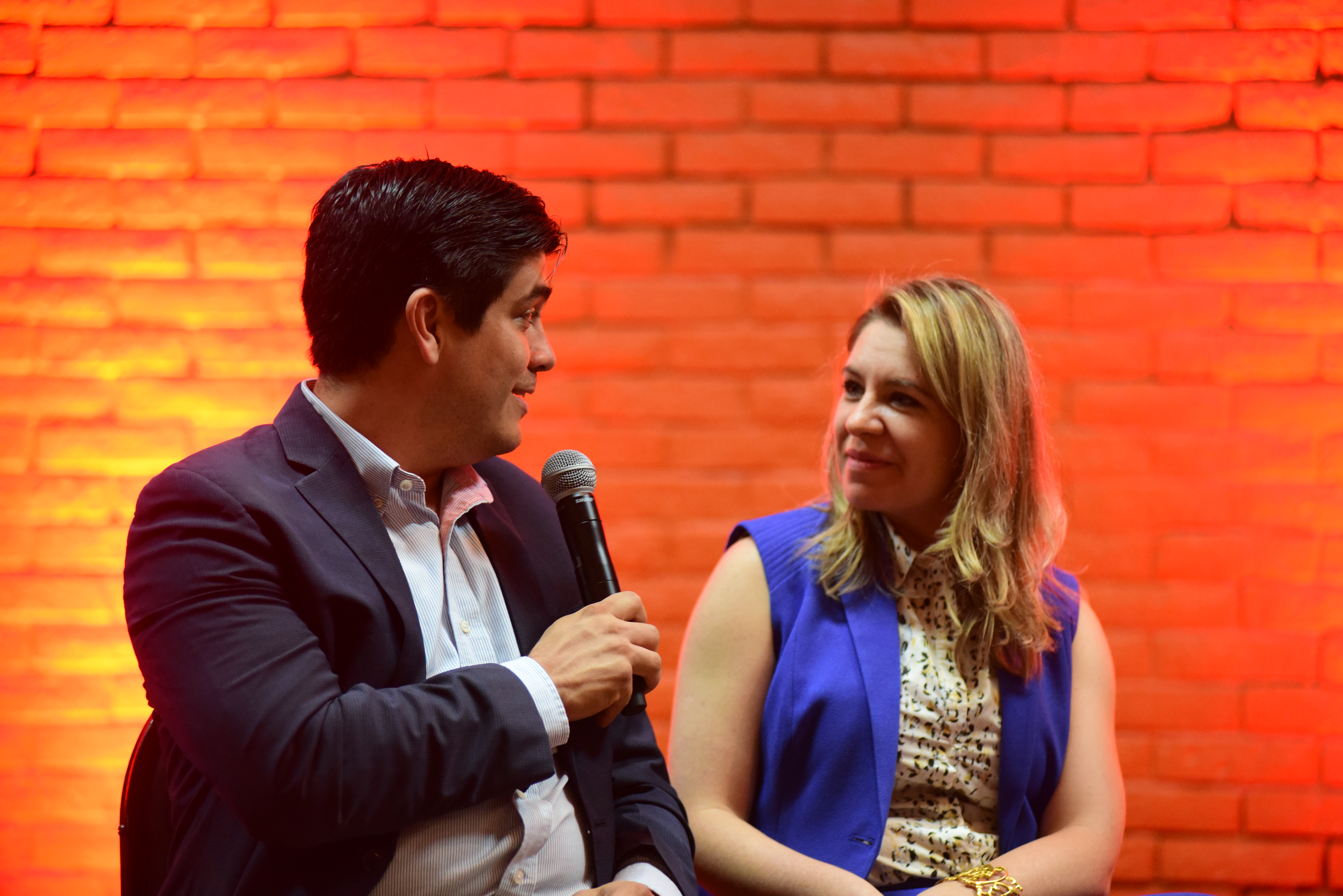 Carlos Alvarado, presidente electo de Costa Rica 2018-2022.